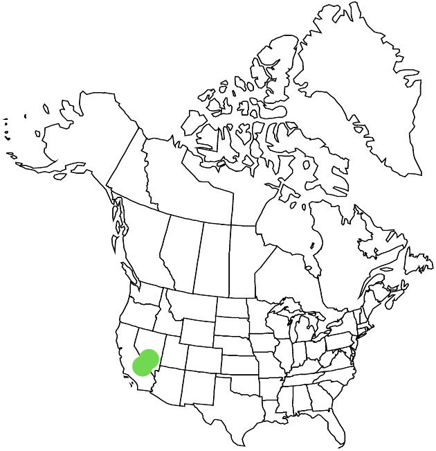 Hecastocleis shockleyi - Mapa de distribución geográfica.